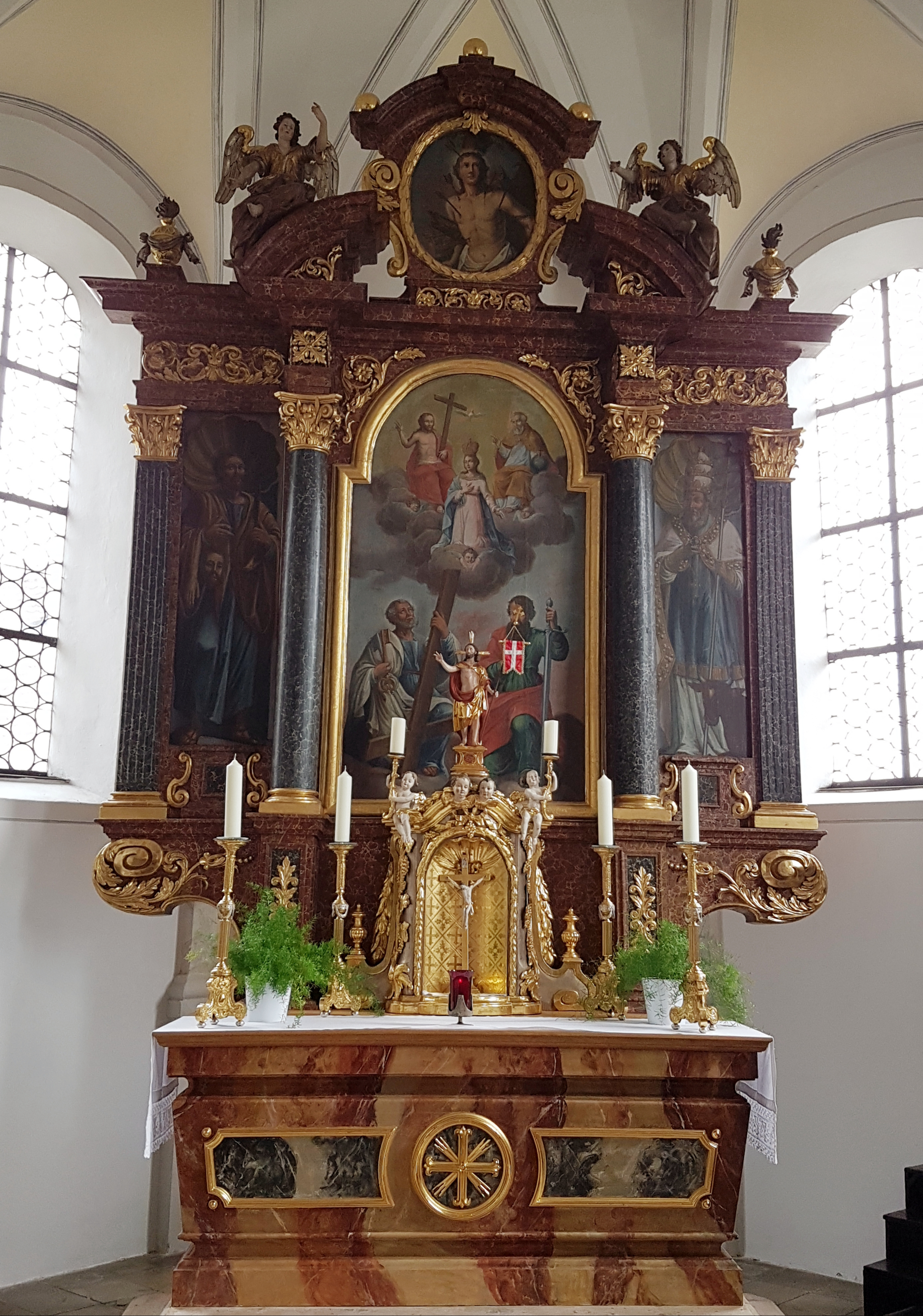 Sankt Peter und Paul (Faistenhaar), Hochaltar